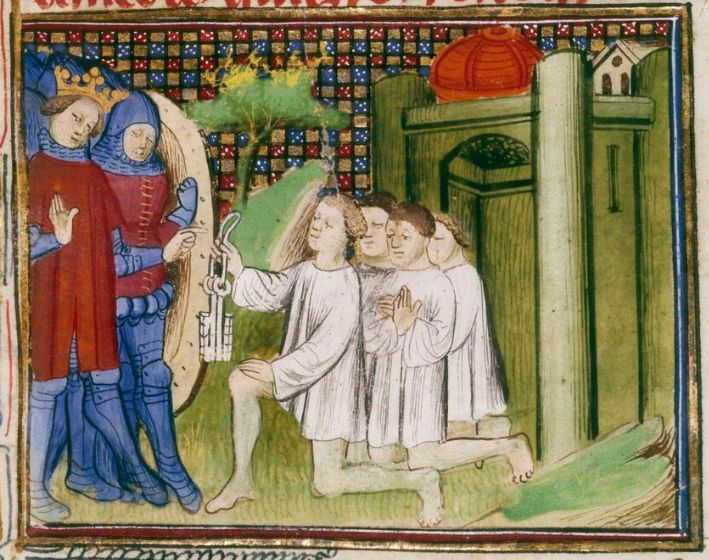 Reddition de Calais (1347). Enluminure extraite des Croniques que fist sire JEHAN FROISSART, Bibliothèque nationale de France, Département des manuscrits, ms. Français 2663, folio 164 recto [1].